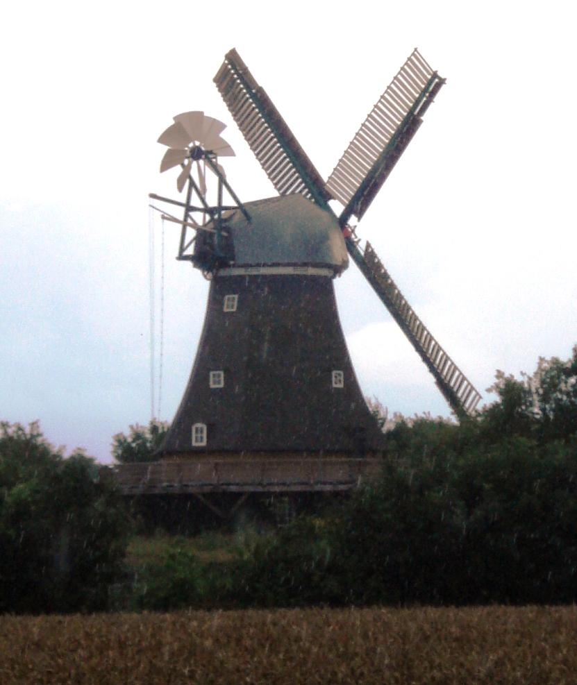 Langenrader Mühle bei Ascheberg